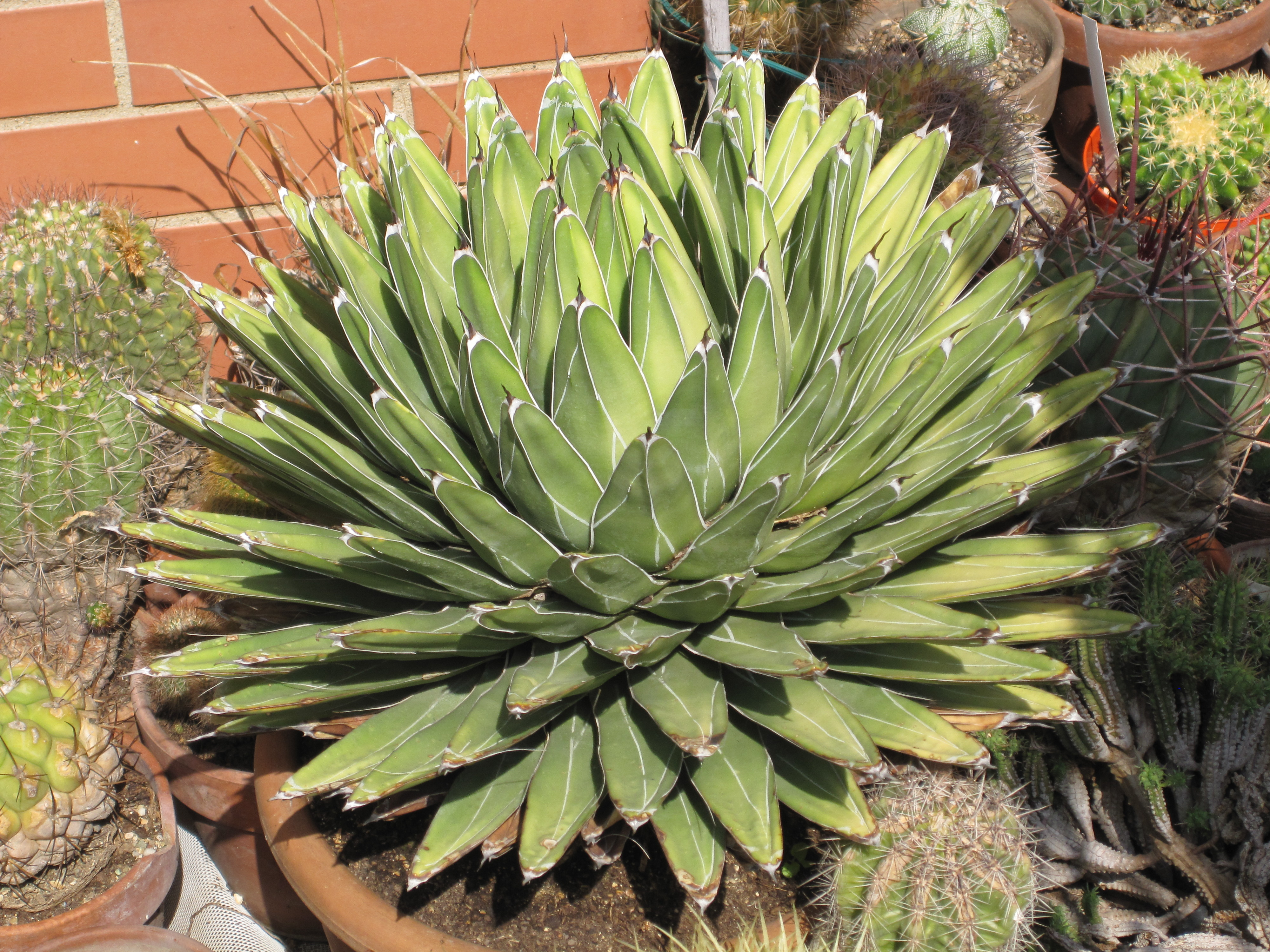 Agave victorie-reginae